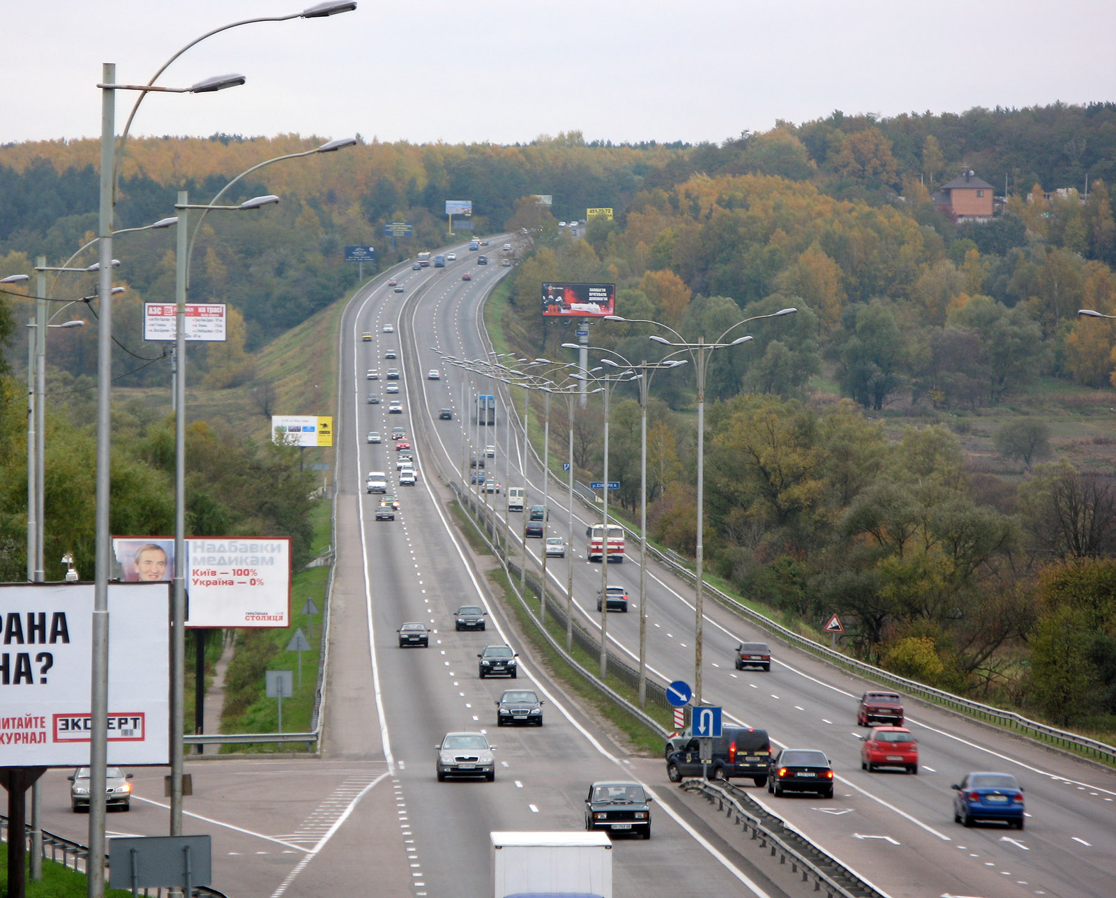 Автодорога Київ — Одеса, с. Віта-Поштова